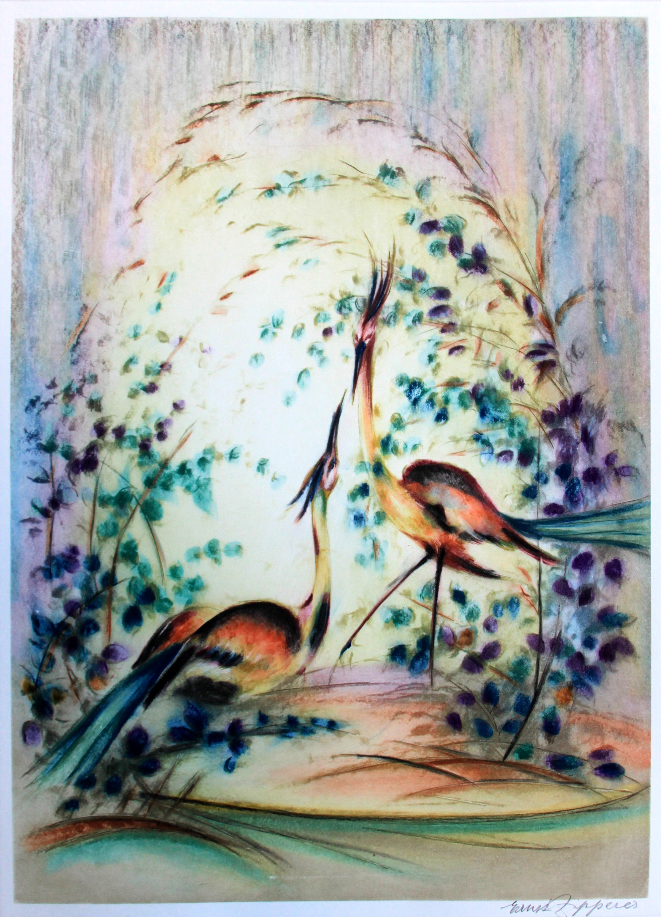 Zwiegespräch, Originalradierung (Heliogravüre)